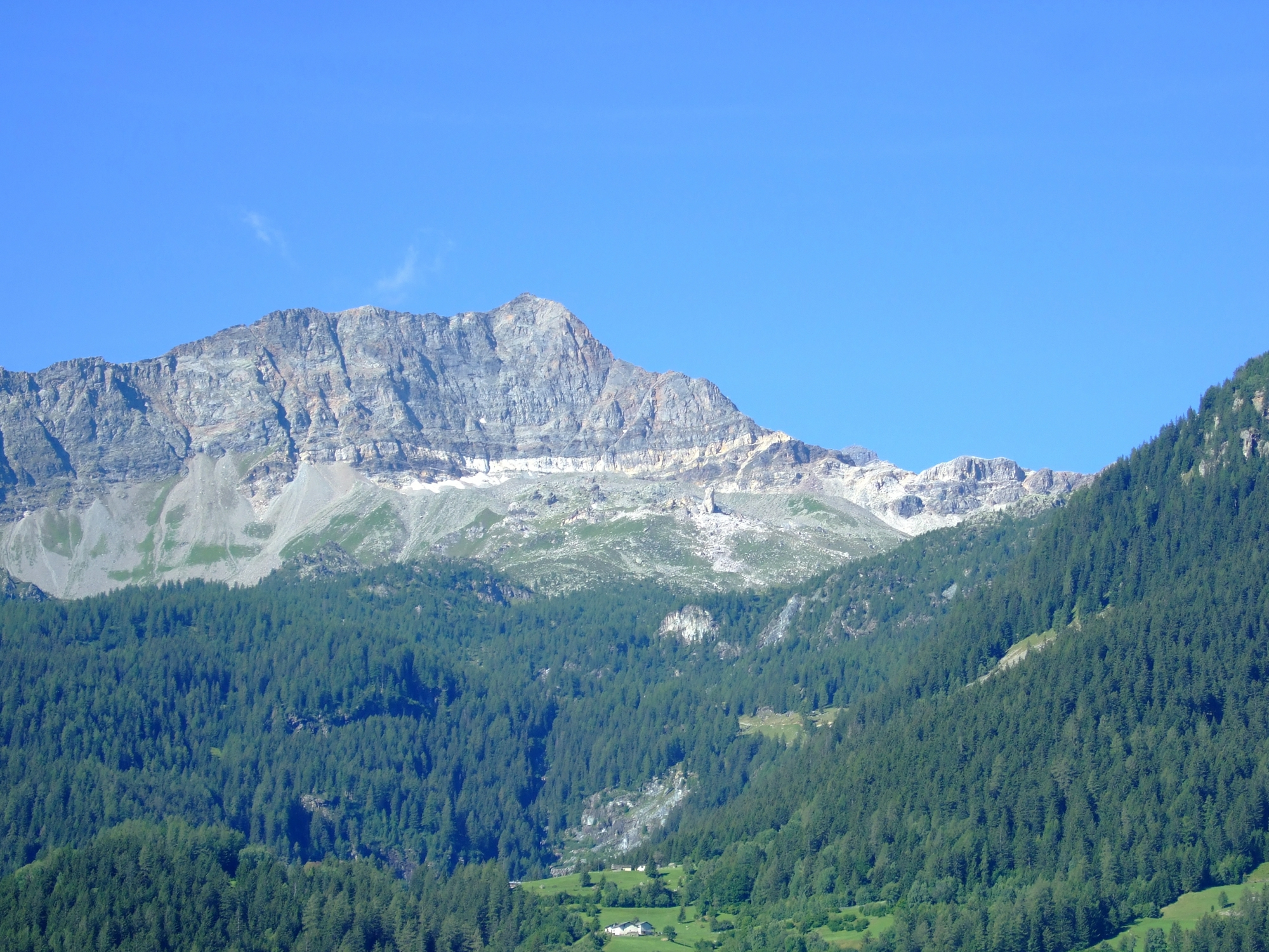 Piz Cancian im Valposchiavo, Grenze Italien-Schweiz, August 2008